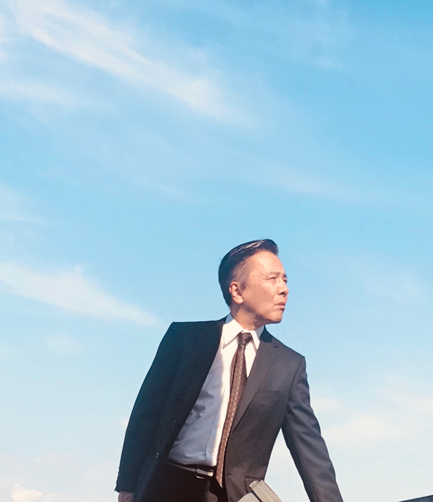 2019年5月5日午後15時ごろ Gallery GAZERY 7F屋上で公演中の川島義信氏